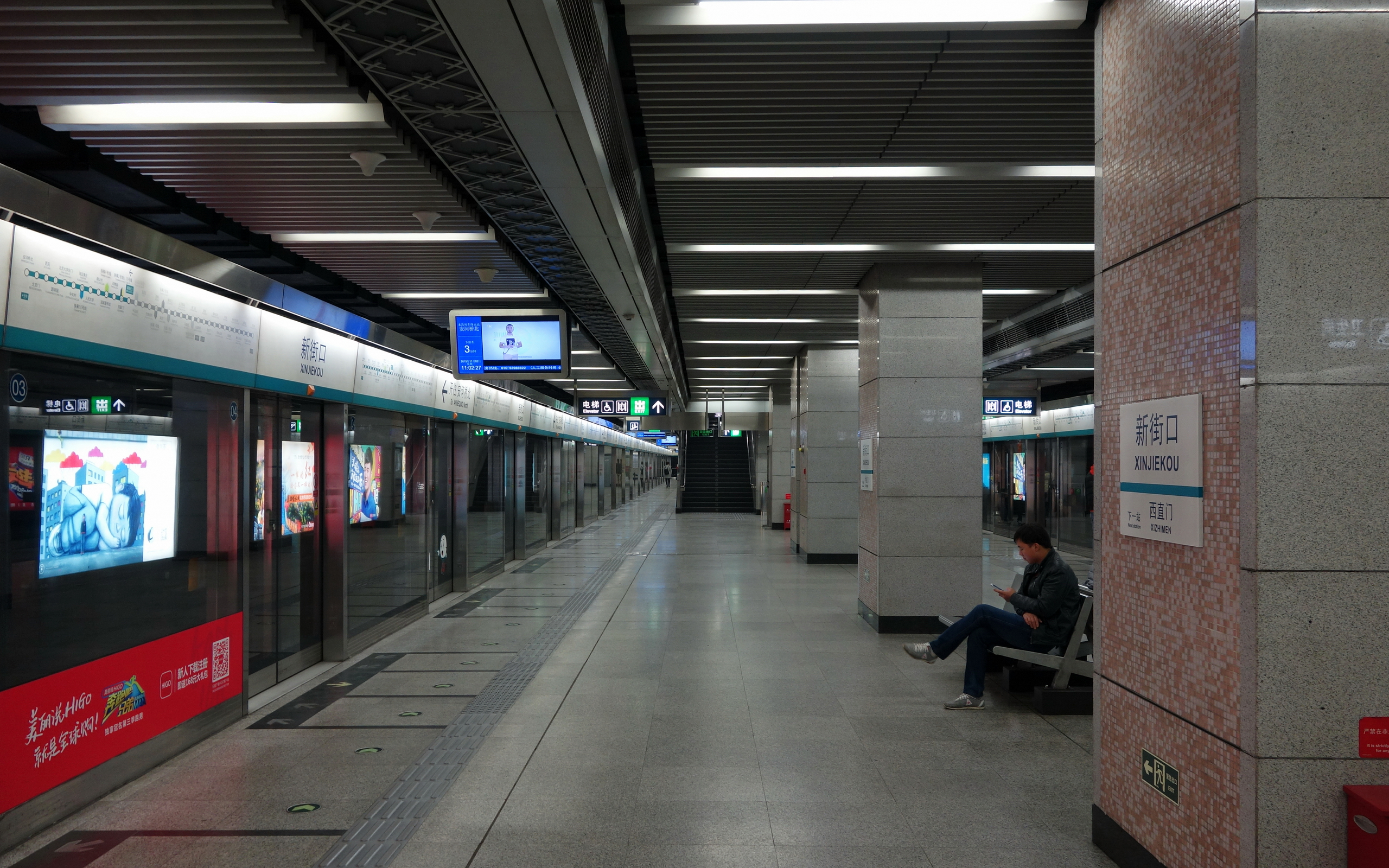 北京地铁4号线新街口站岛式站台